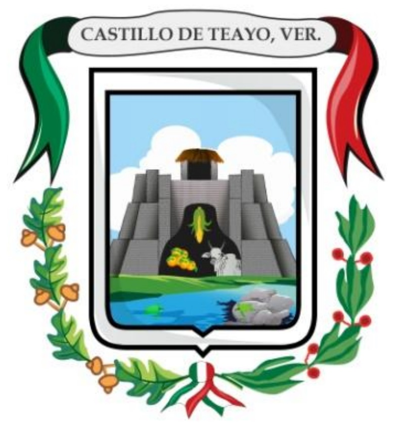 Escudo de Castillo de Teayo